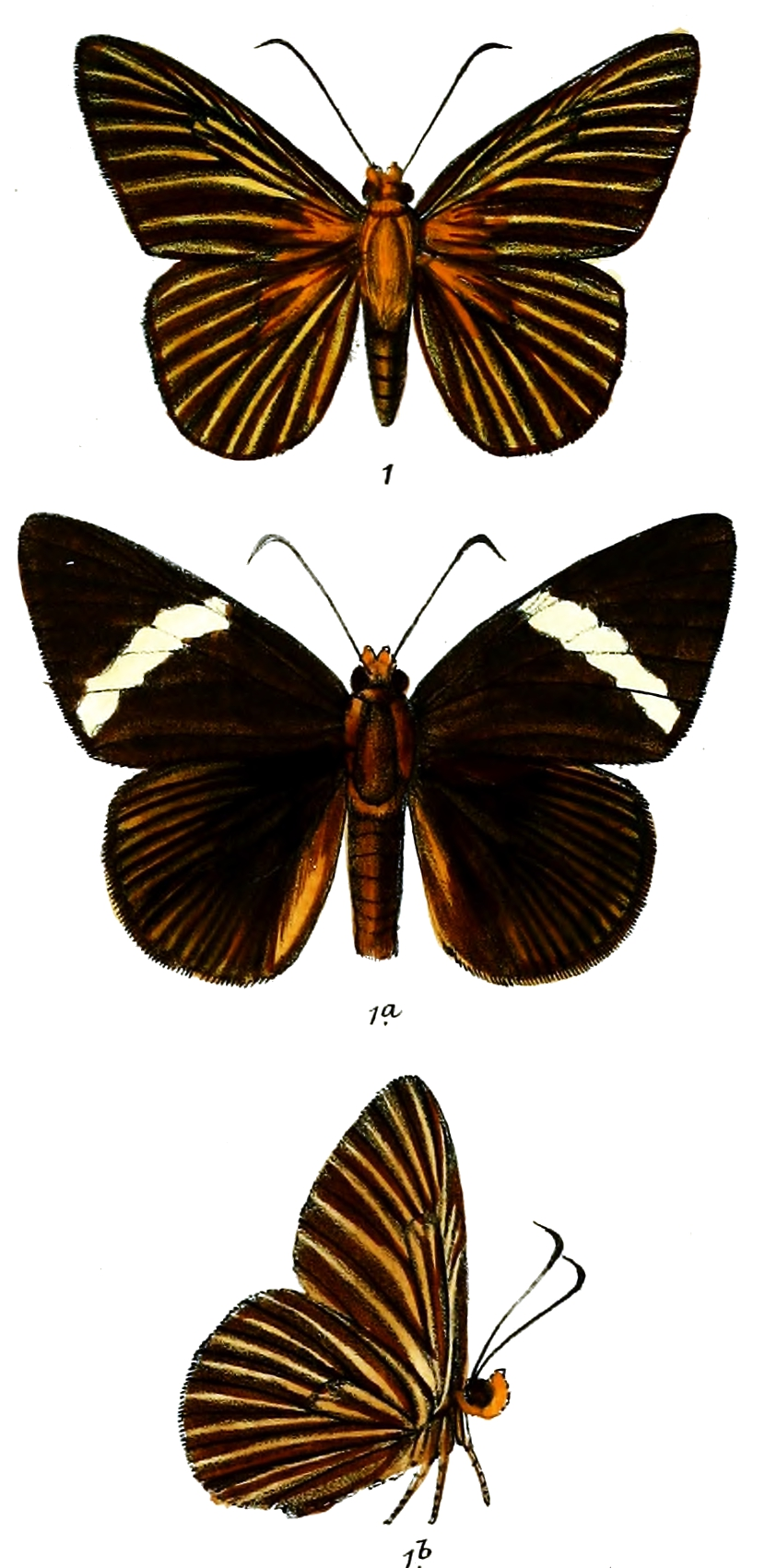 Capila jayadeva (male, female, male underside)